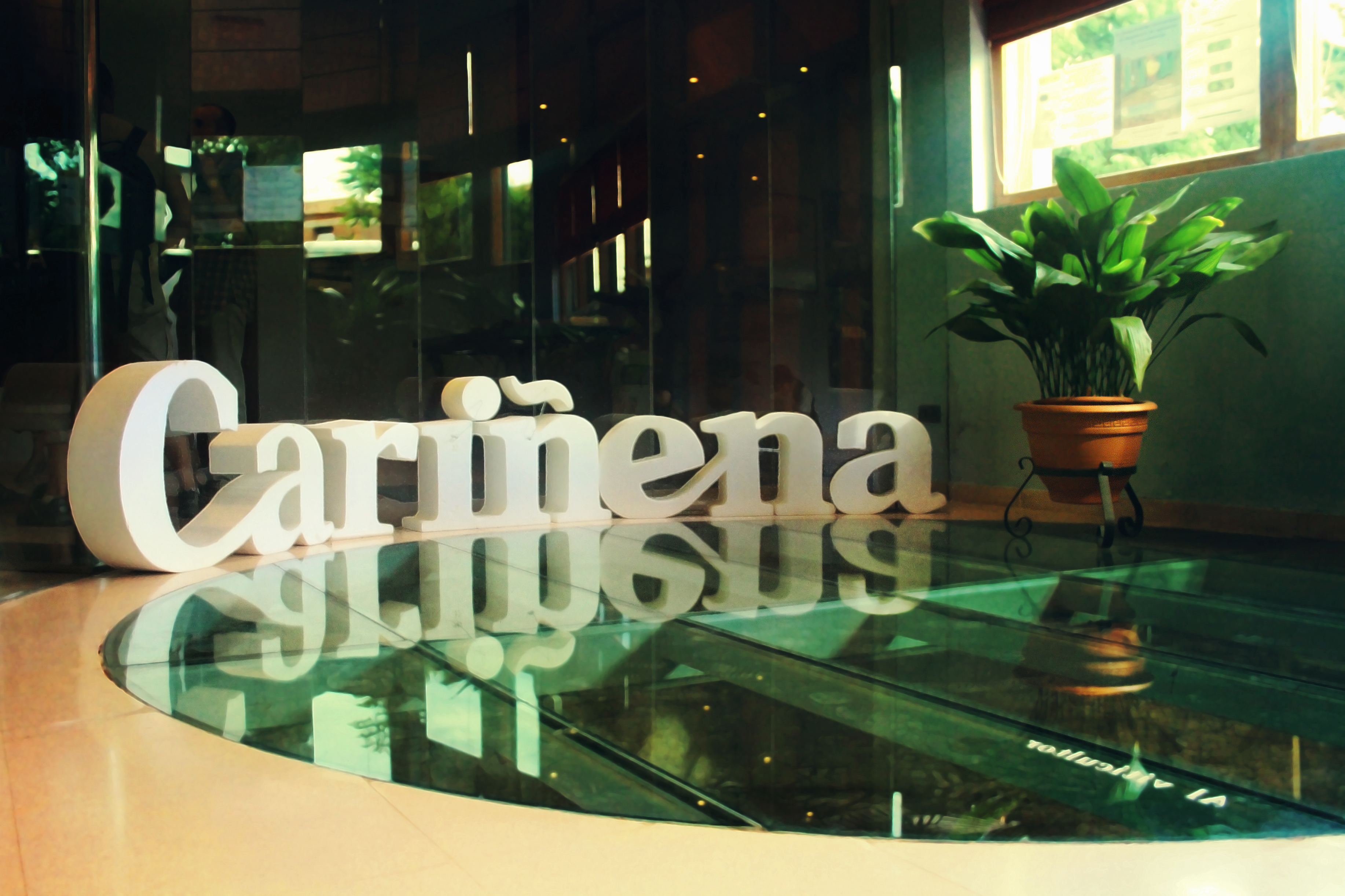 Cariñena +info Museo del Vino, Cariñena, España Big On Black